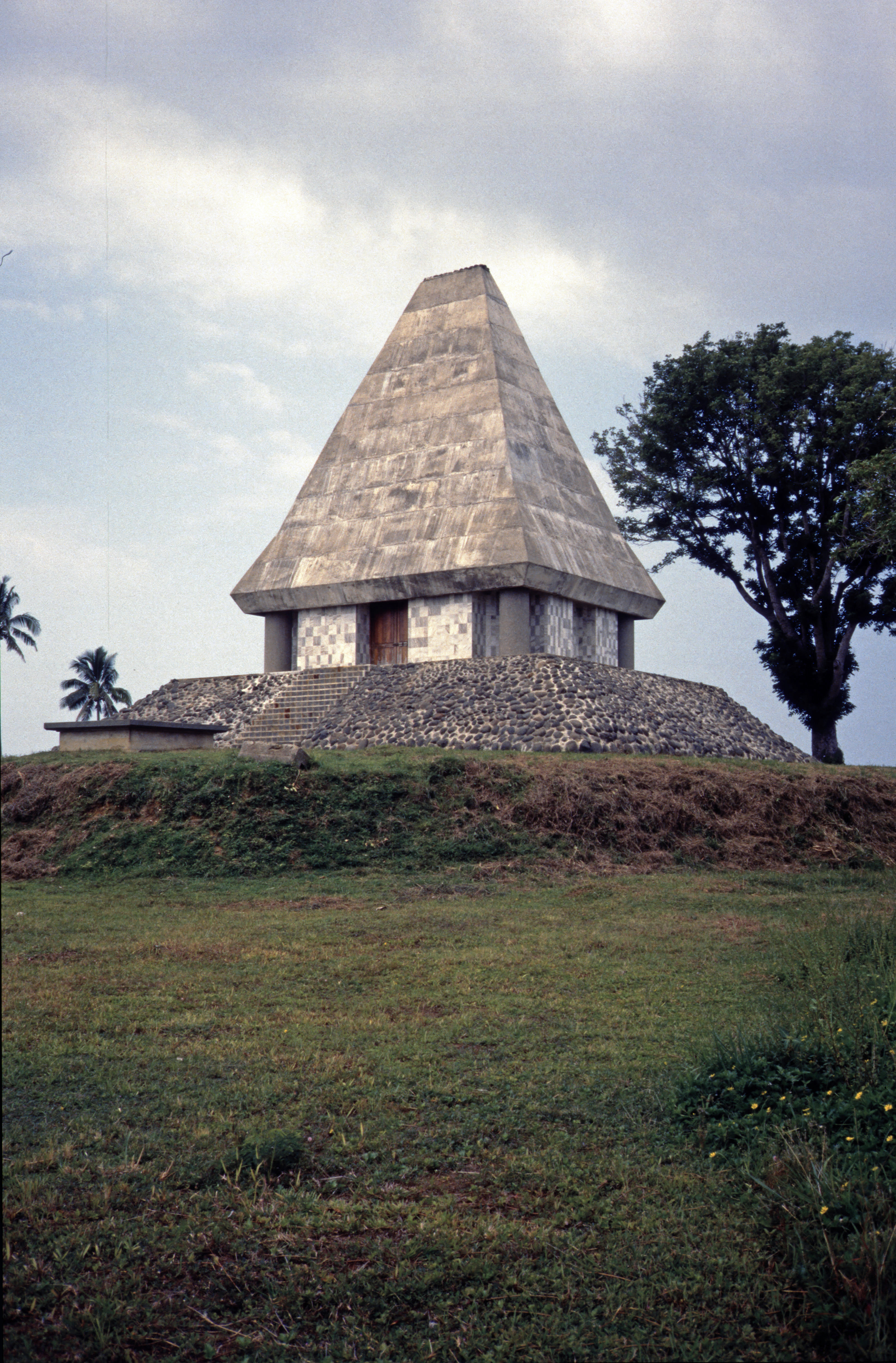 Mausoleum på ön Mbau (Bau). Bilden är inskannad dia-bild som togs jul-nyår 1985-86.